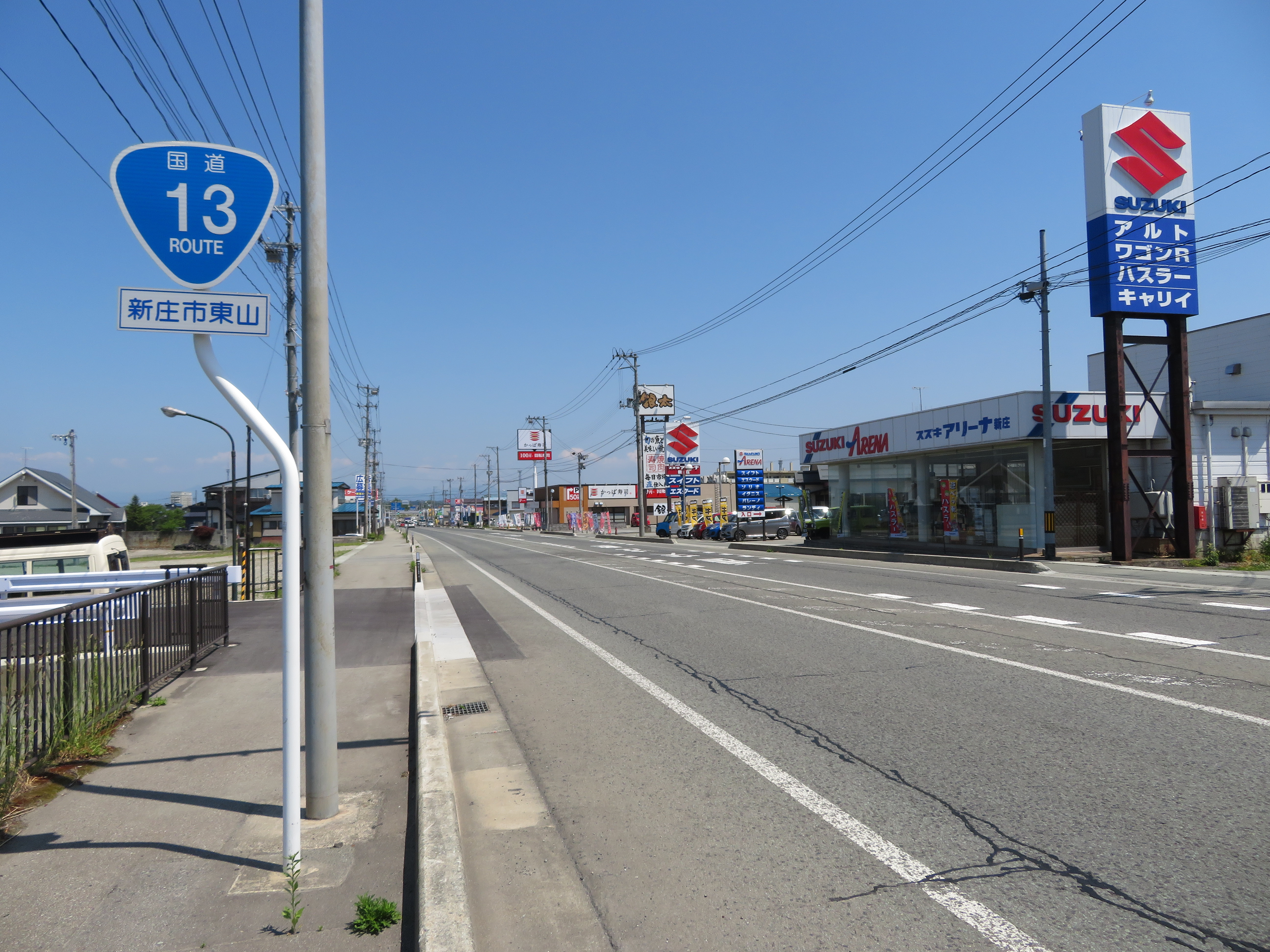 国道13号線新庄バイパス山形県新庄市東山付近（湯沢方面を撮影） Canon PowerShot SX720 HS